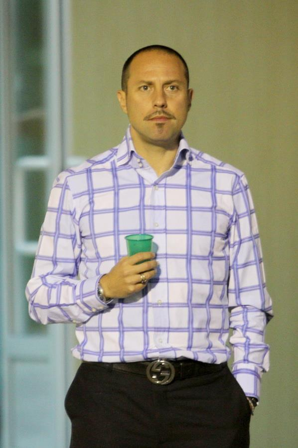 Игор Йовичевич